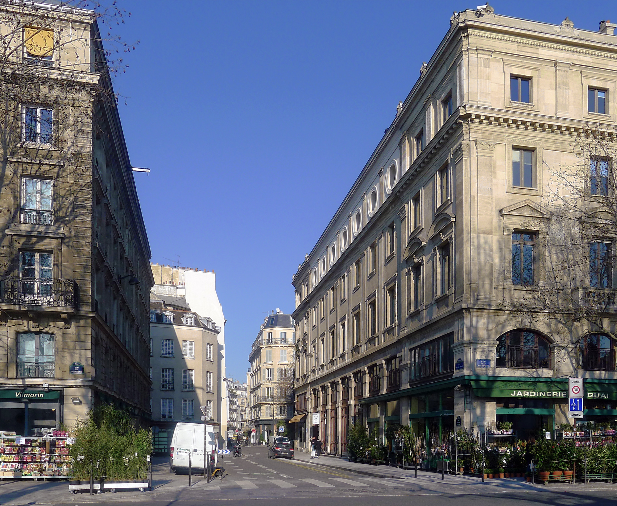 Rue Edouard-Colonne - Parie Ier